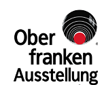 Logo der Oberfranken-Ausstellung.